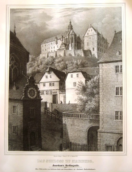 Kramp & Comp Offenbach: Lithografie Marburger Schloss ca.1840. Im Vordergrund rechts der Westteil des Kerner.